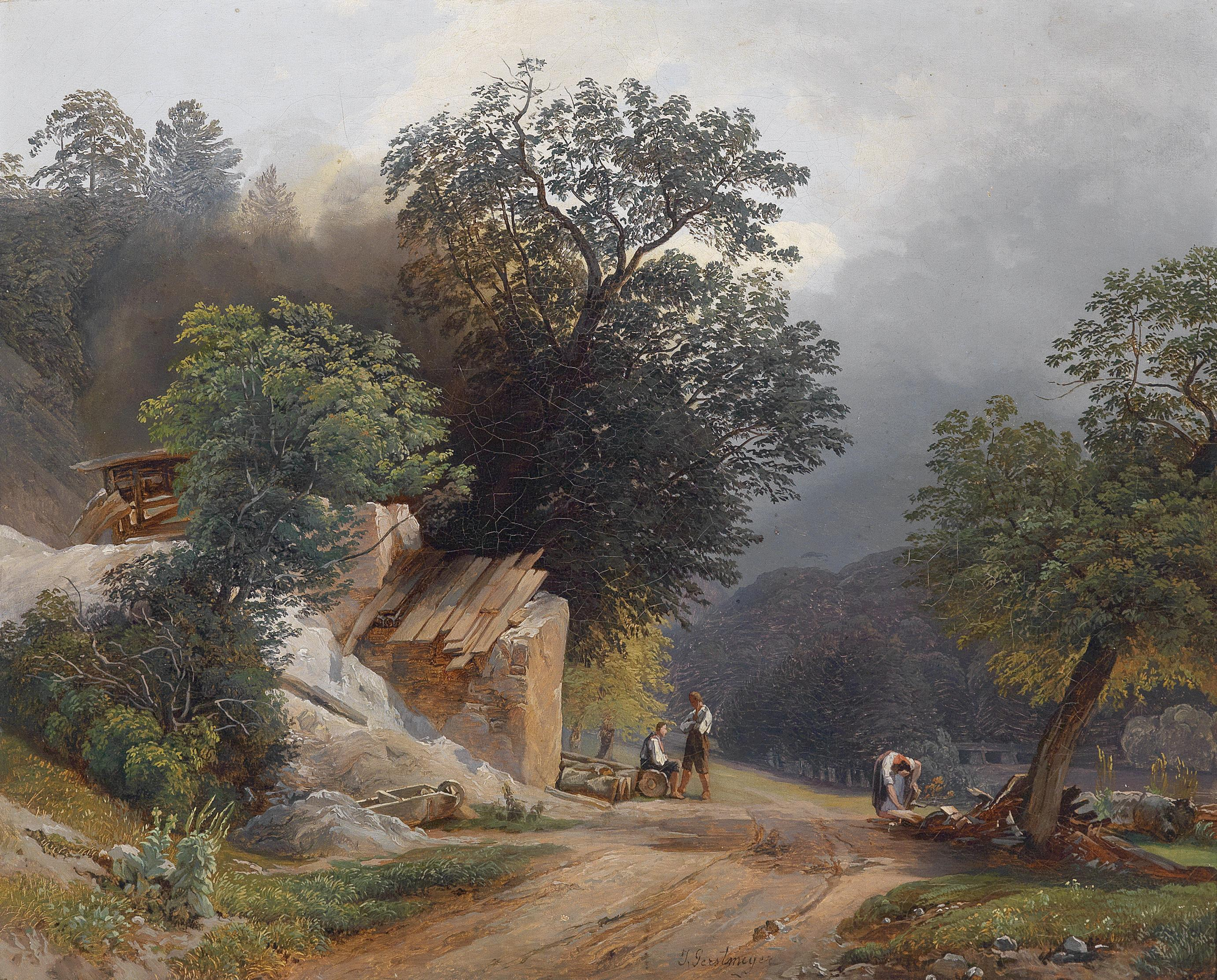 Holzsammler auf der Landstrasse, signiert J. Gerstmeyer, Öl auf Leinwand, 34 x 42,5 cm